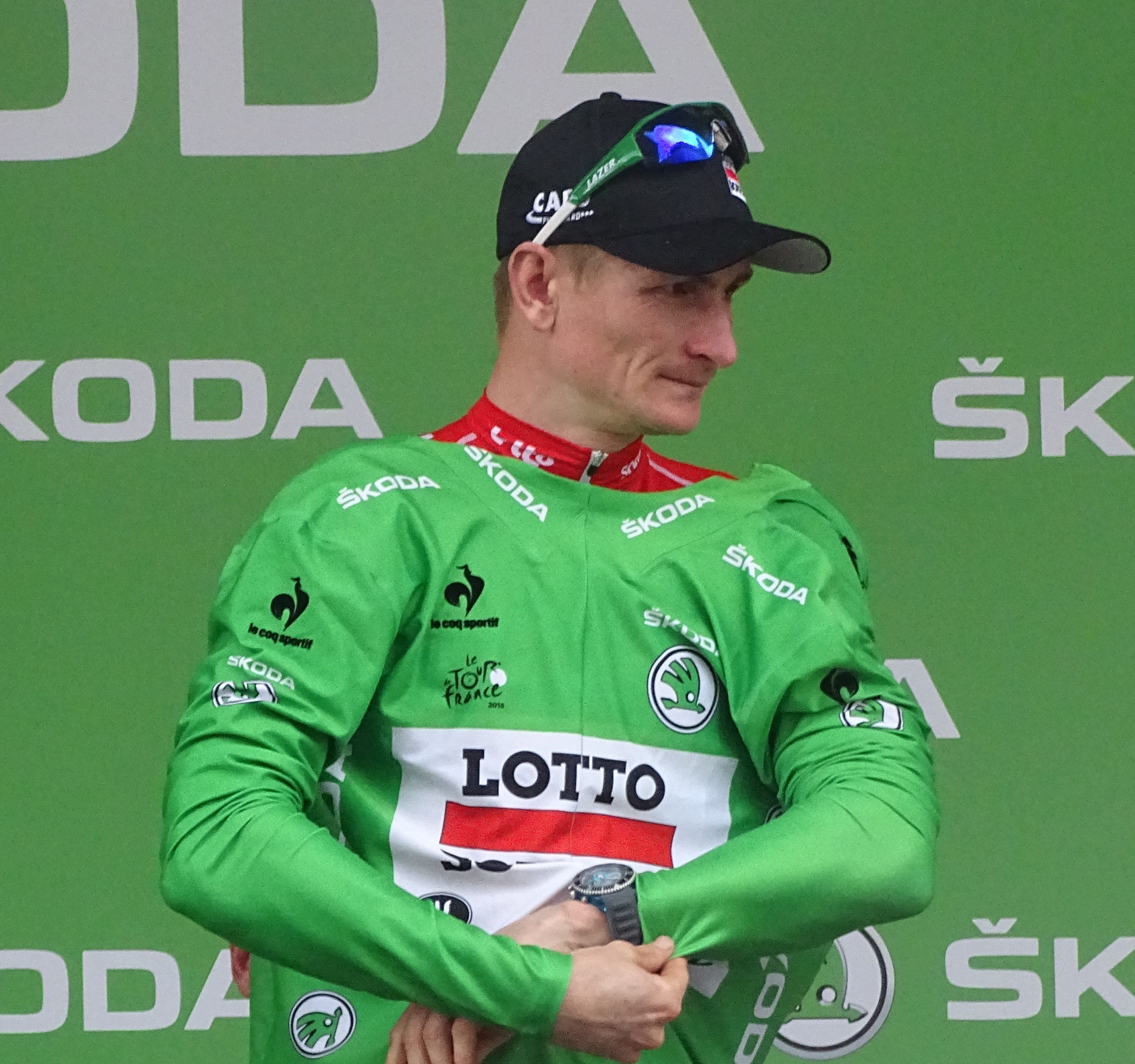 Reportage réalisé le mardi 7 juillet à l'occasion de l'arrivée de la quatrième étape du Tour de France 2015 à Cambrai, Nord-Pas-de-Calais, France.